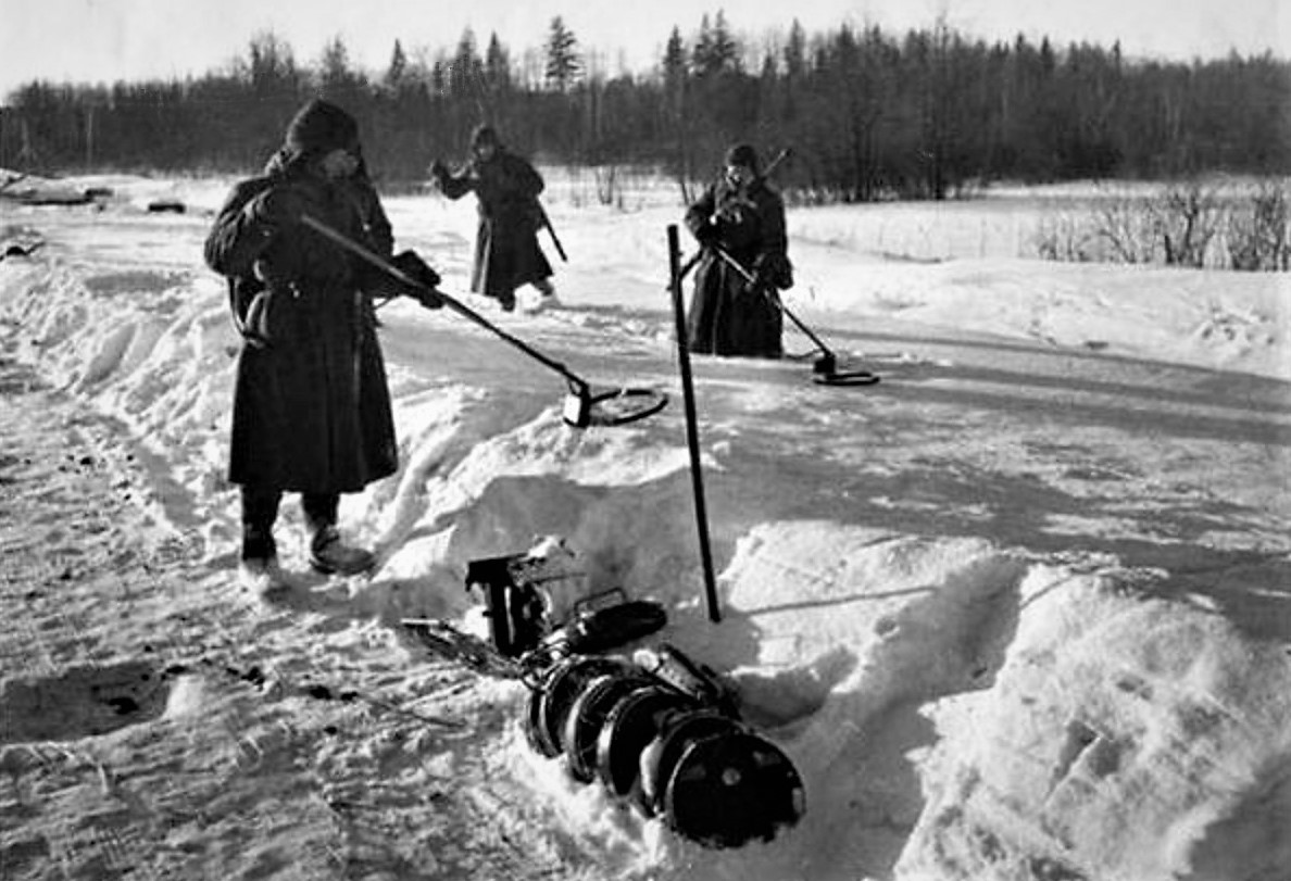 Сапёры ищут мины